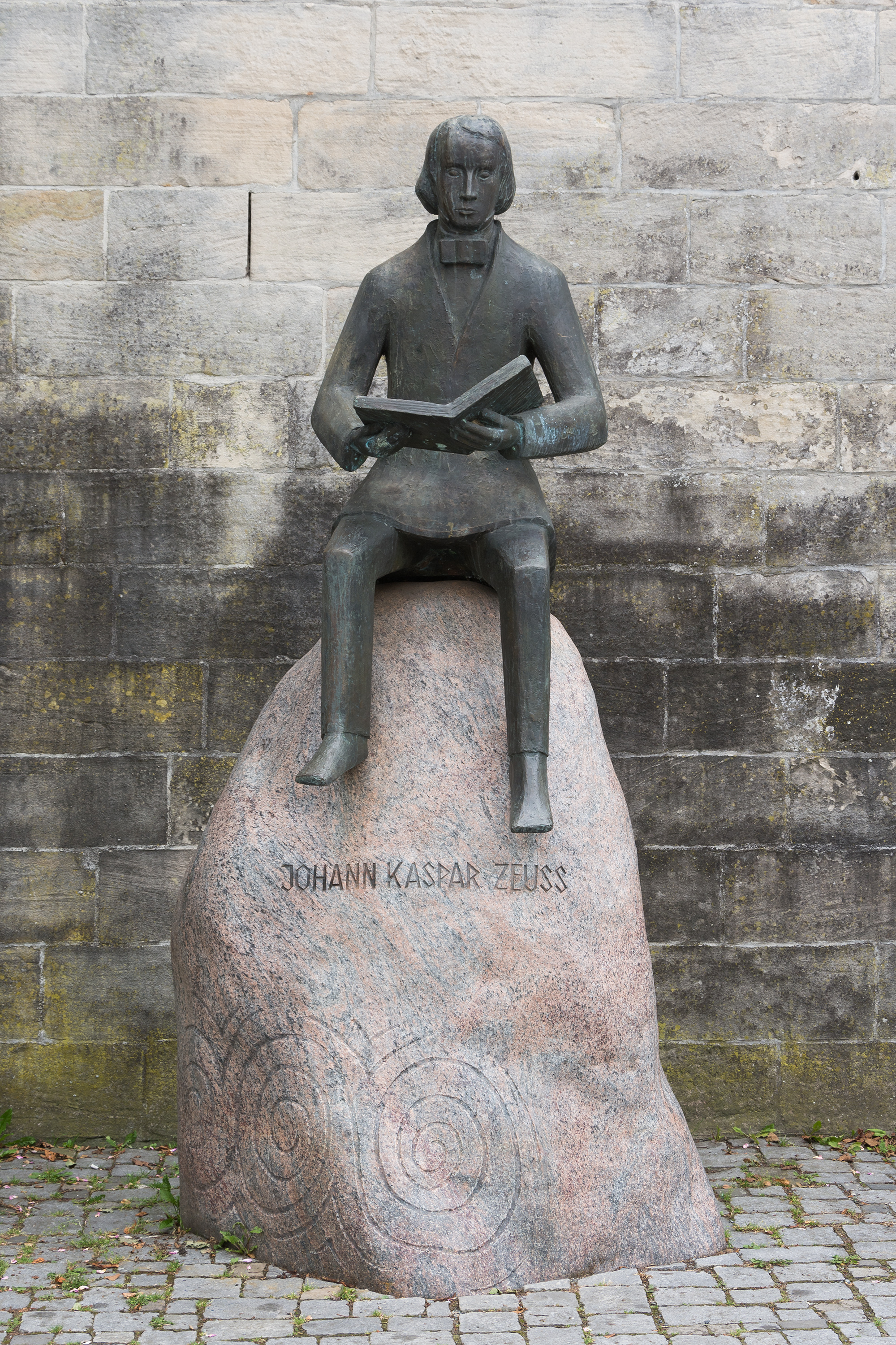 Denkmal für Johann Kaspar Zeuß am Stadtgraben in Kronach. Die Bronzeskulptur wurde von Hubert Weber geschaffen.